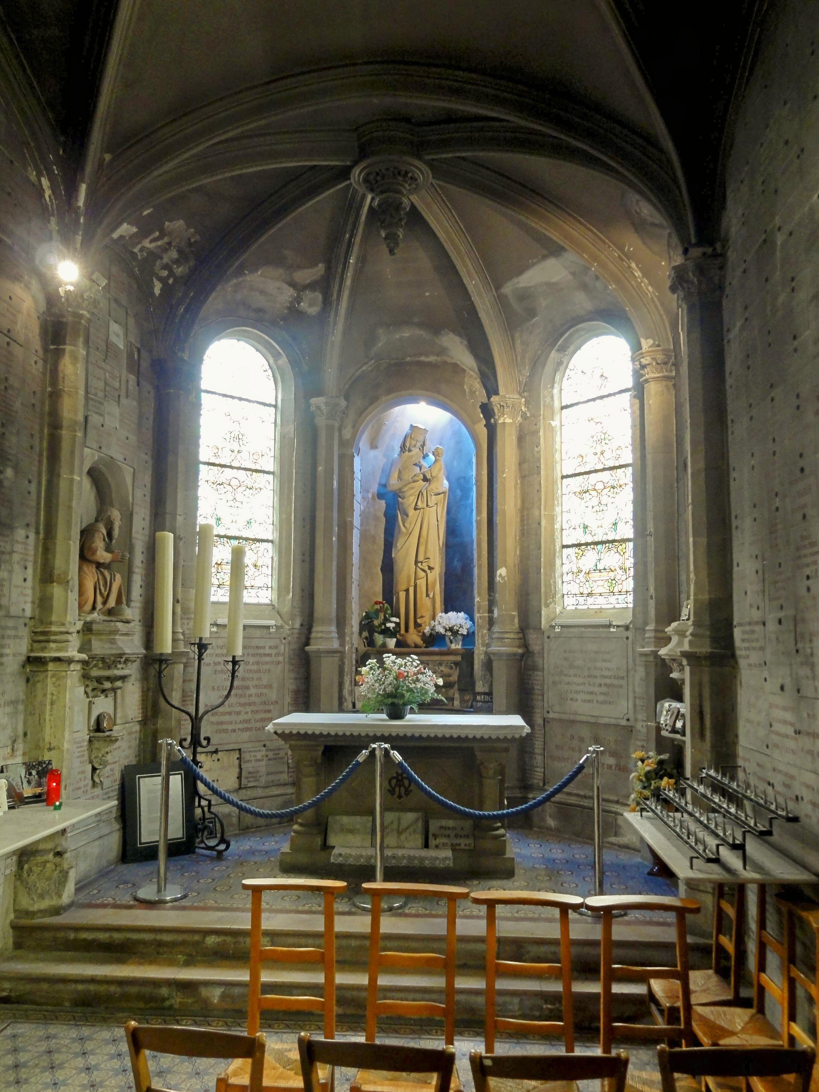 La chapelle de la Vierge, créée en 1862 par la transformation de l'ancienne chapelle baptismale à laquelle fut adjointe une abside au sud, afin d'abriter la Vierge à l'Enfant miraculeuse du XIIIe siècle.